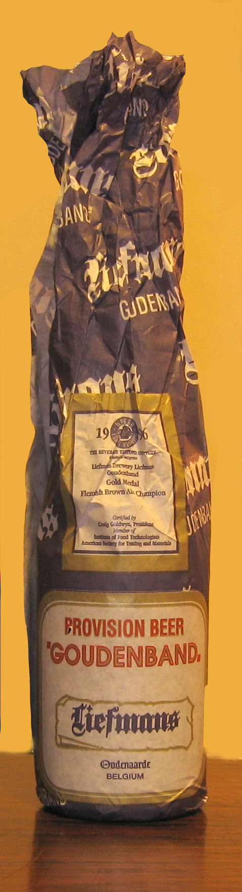 Beer Bottle of 'Liefmans Goudenband'. Belgian beer.